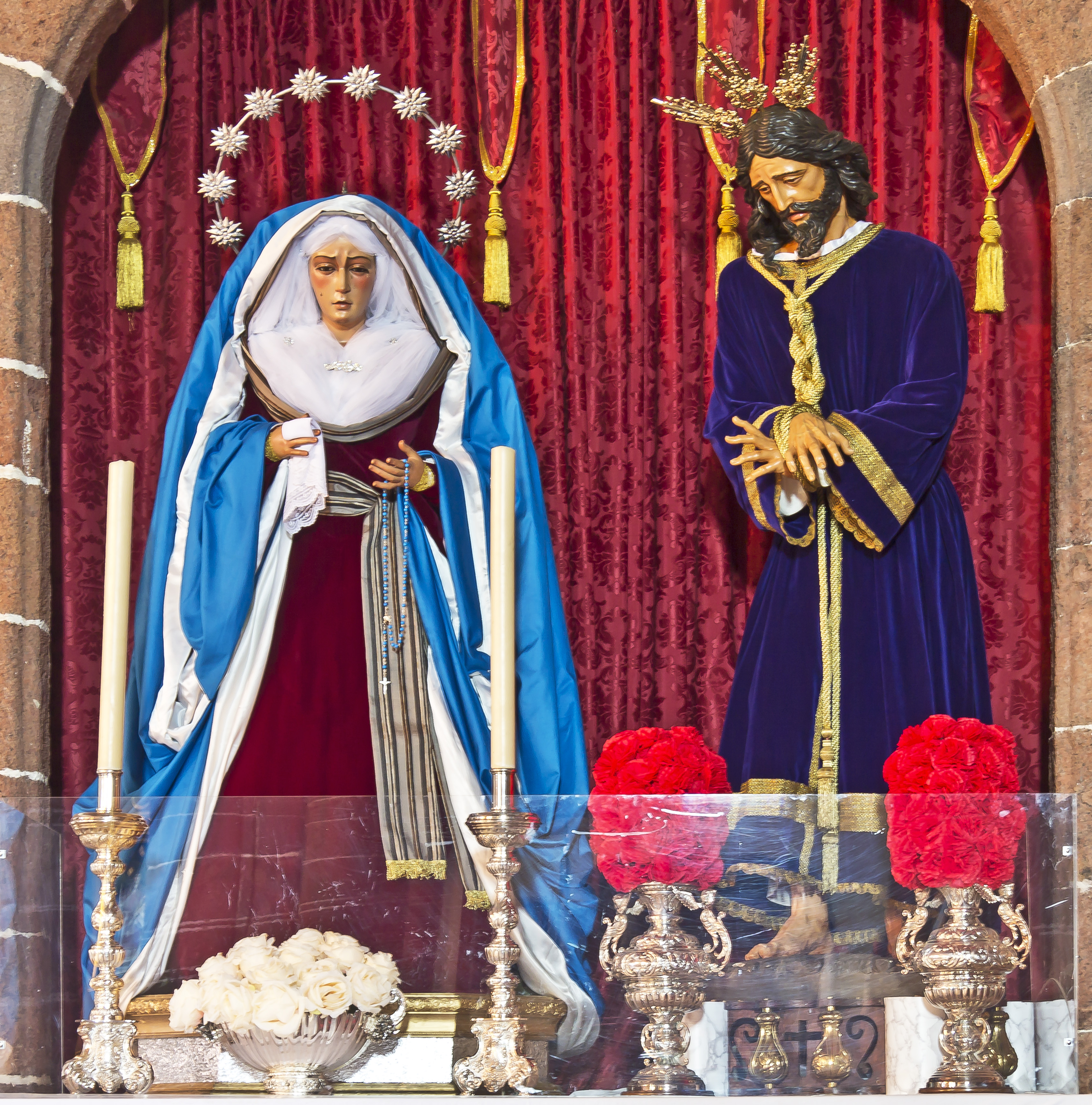 Die Figuren „Nuestro Padre Jesús Cautivo“, geschaffen von Juan Delgado Martín-Prat und „María Santísima de la Esperanza Macarena“ geschaffen von von Antonio Giménez Martínez in der Kirche Nuestra Señora de la Concepción, Santa Cruz de Tenerife